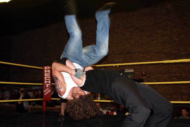 Le Freak qui utilise une souplesse avec pont maintenir son adversaire au sol.